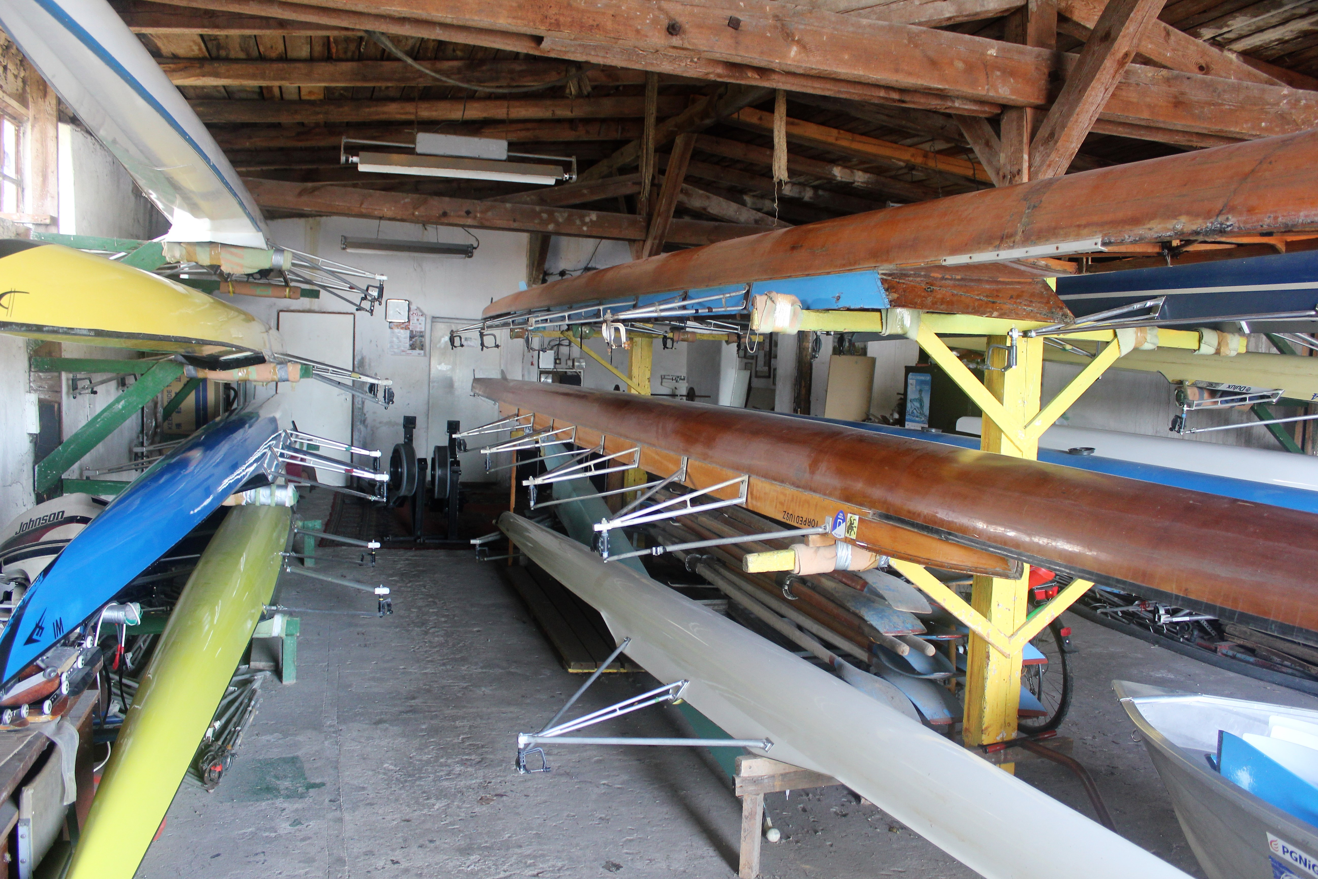 Przystań Unii Tczew - wnętrze hangaru